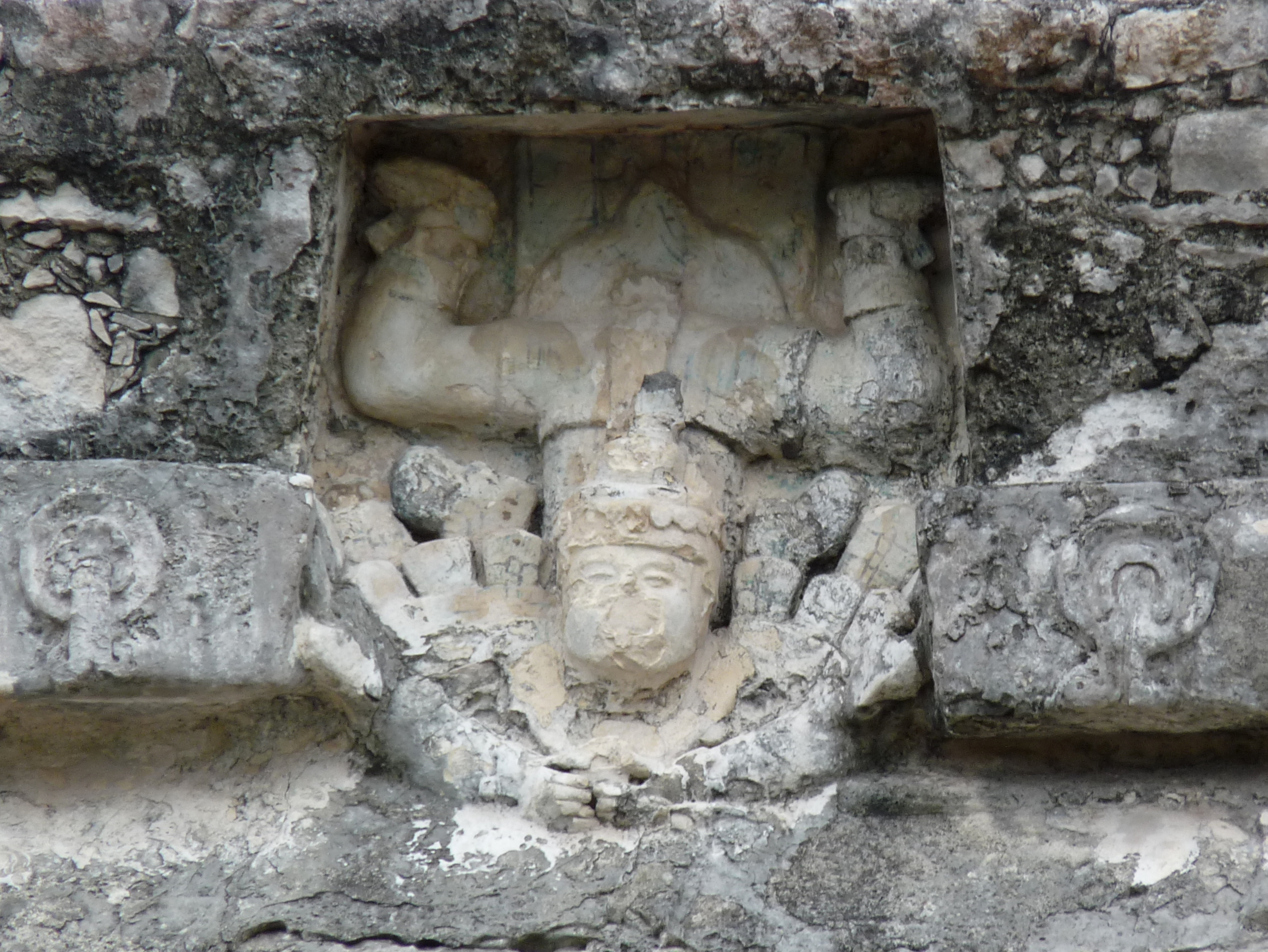 Bajorrelieve de estuco del Templo del Dios Descendente de Tulum.